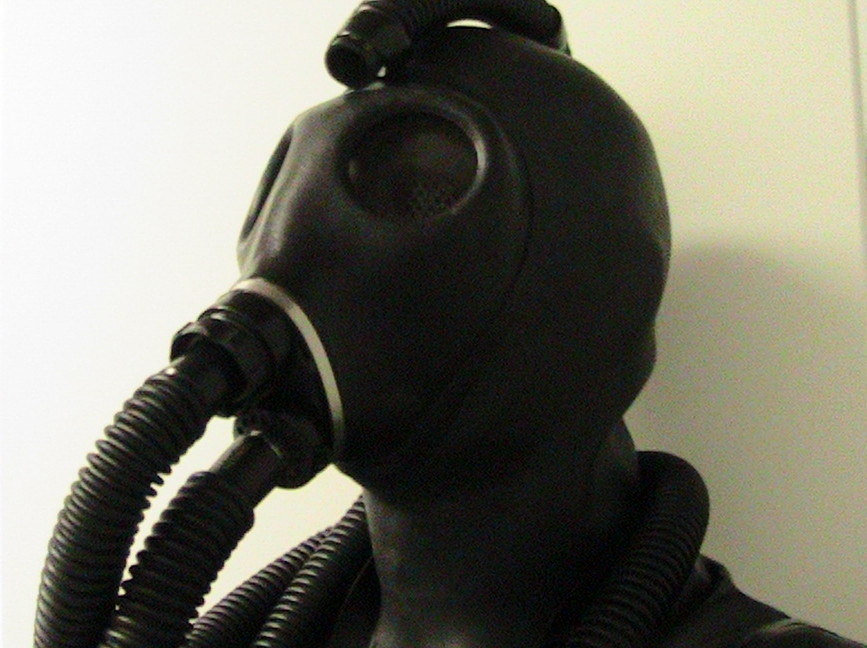 Person in Latexanzug mit Untermaske und Gasmaske, angeschlossen sind zwei Atemschläuche